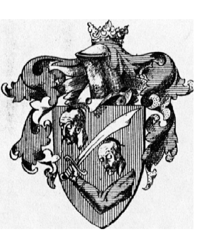 Erdélyi Magyar, Székely nemesi címer, metszet, az 1576-os címer képmására, ami a hősiességet és a nemzet iránti hűséget, bátorságot jelképezi